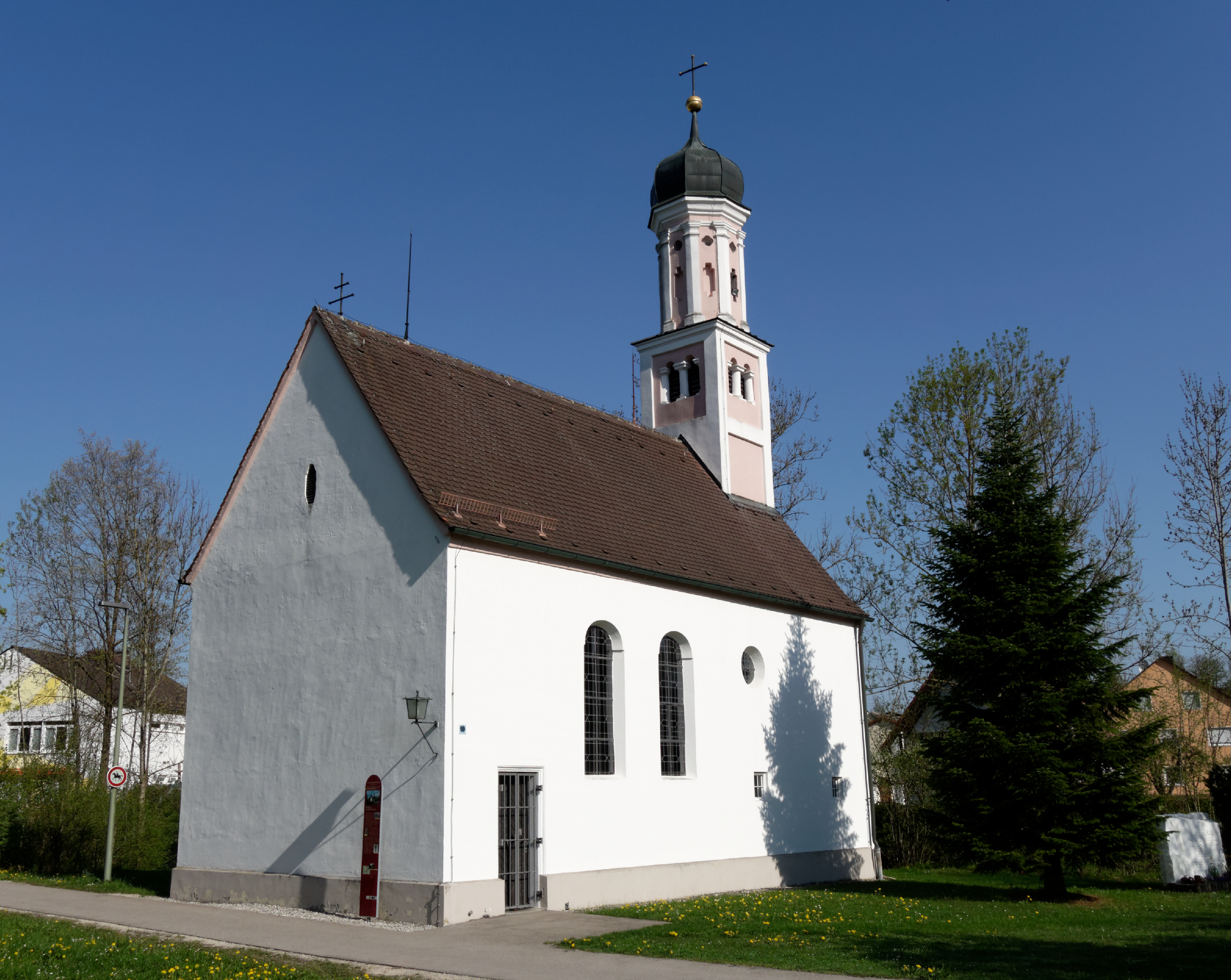 St. Thomas in Rederzhausen (Friedberg)